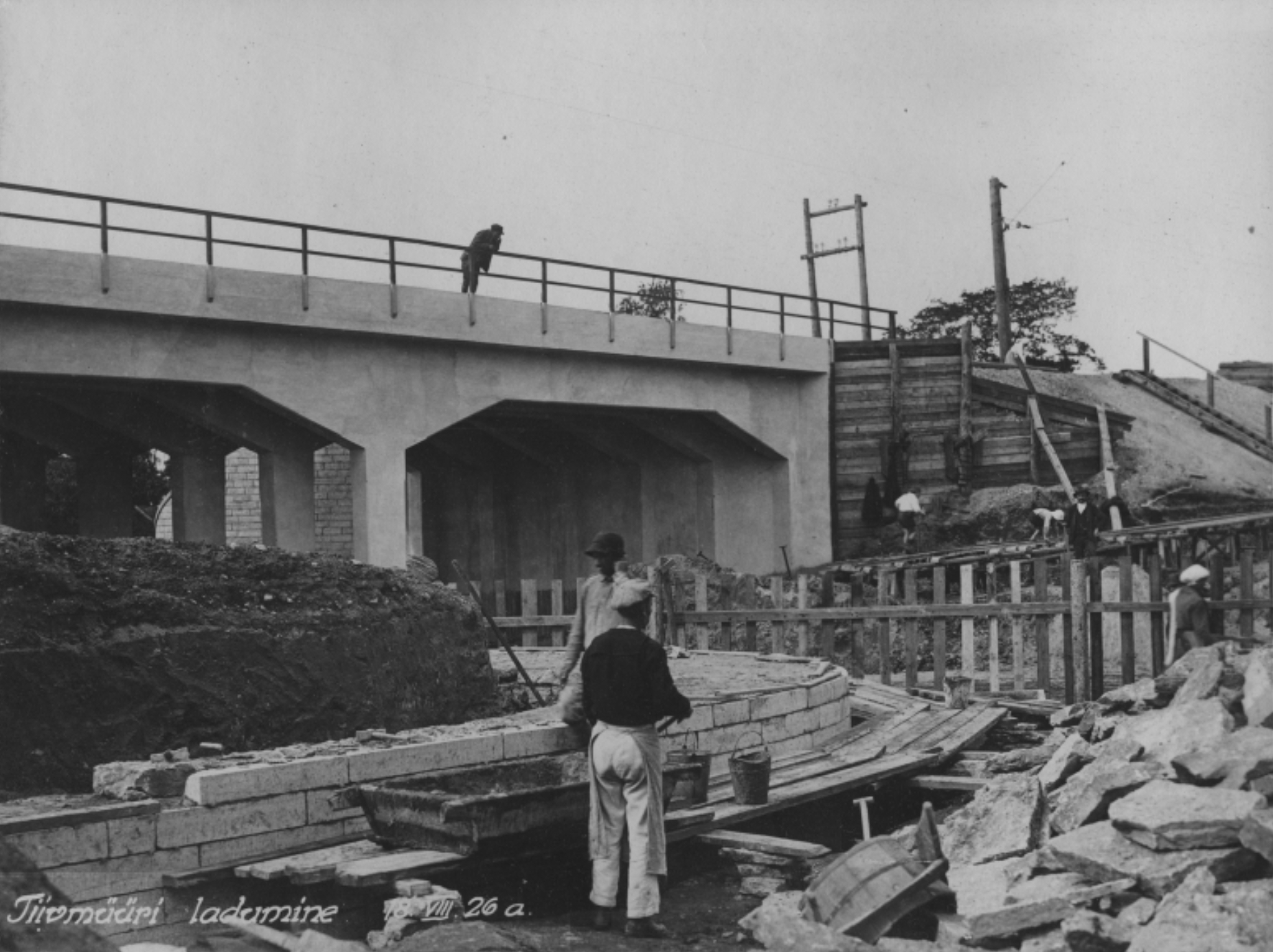 Paldiski mnt viadukti ehitamine, tiivmüüri ladumine.